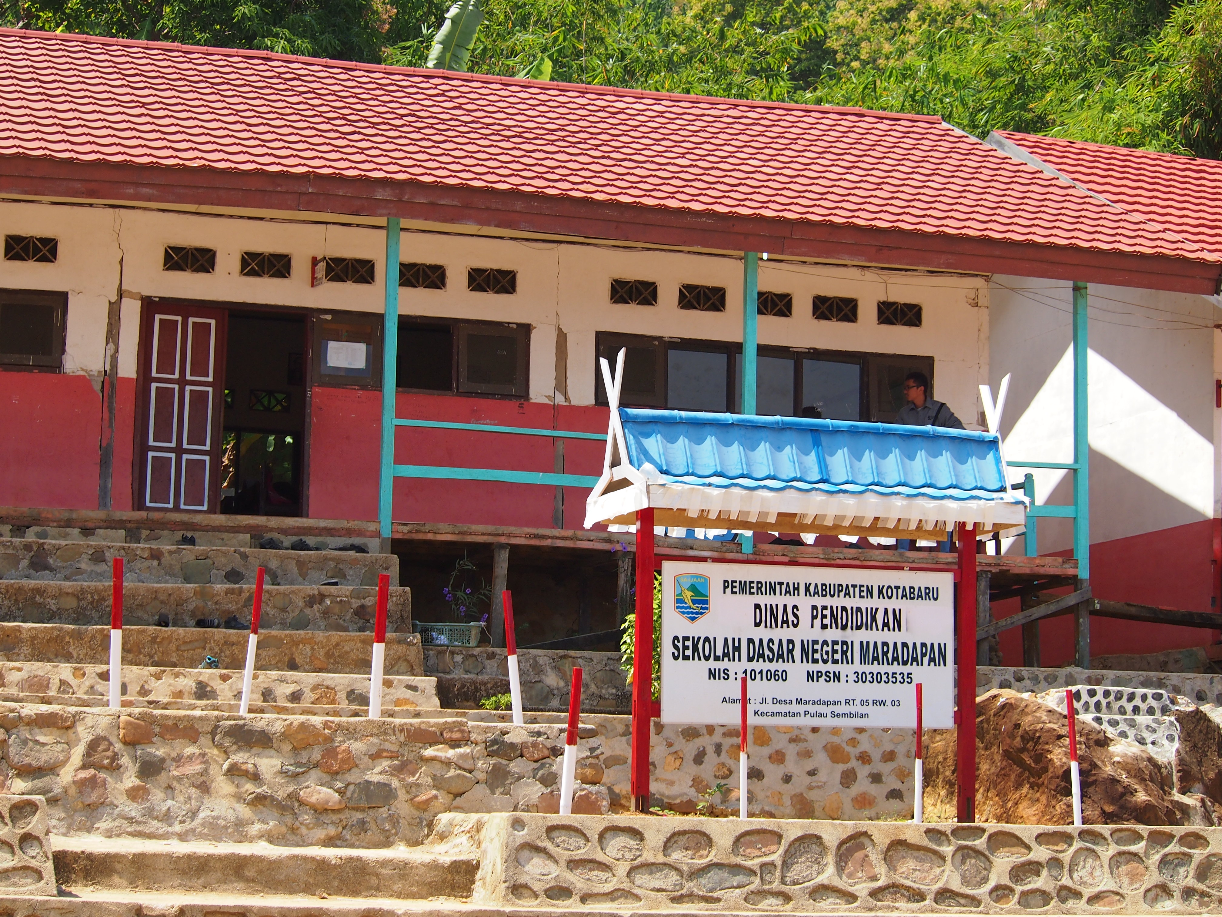 SDN Maradapan